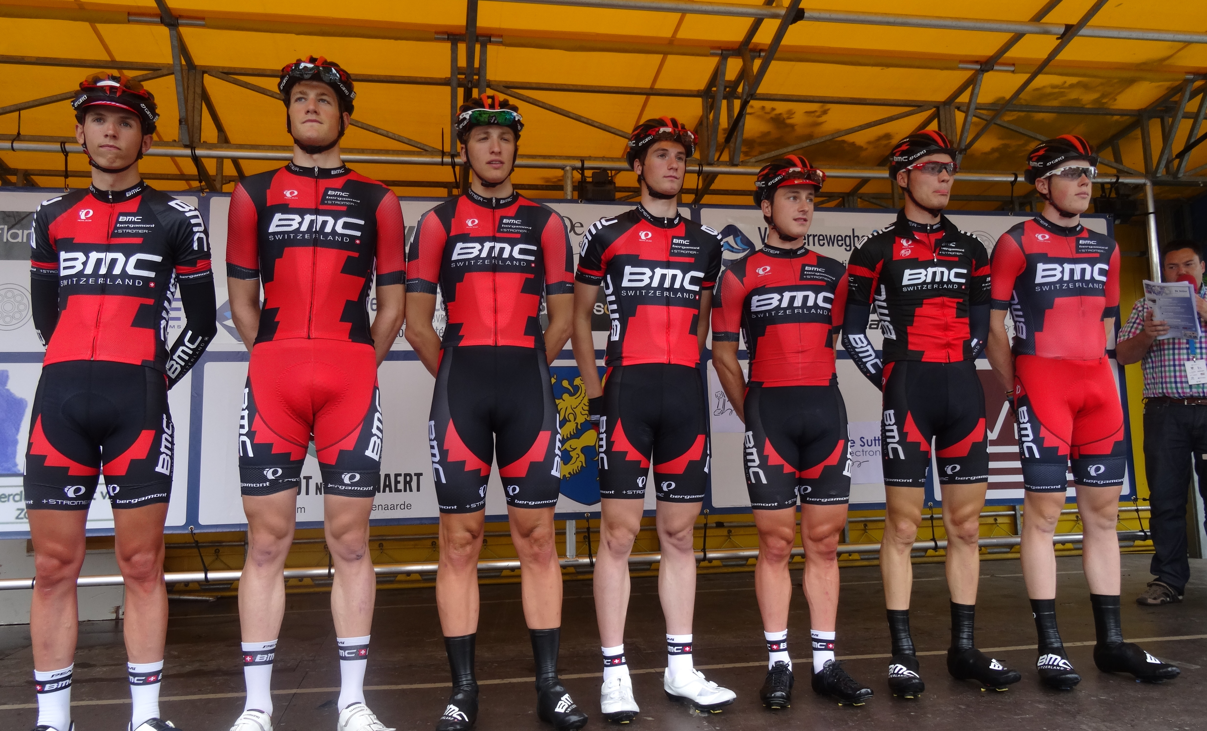 Reportage photographique réalisé le samedi 5 juillet à l'occasion du départ et de l'arrivée du Circuit Het Nieuwsblad espoirs 2014 à Grotenberge (Zottegem), Belgique.